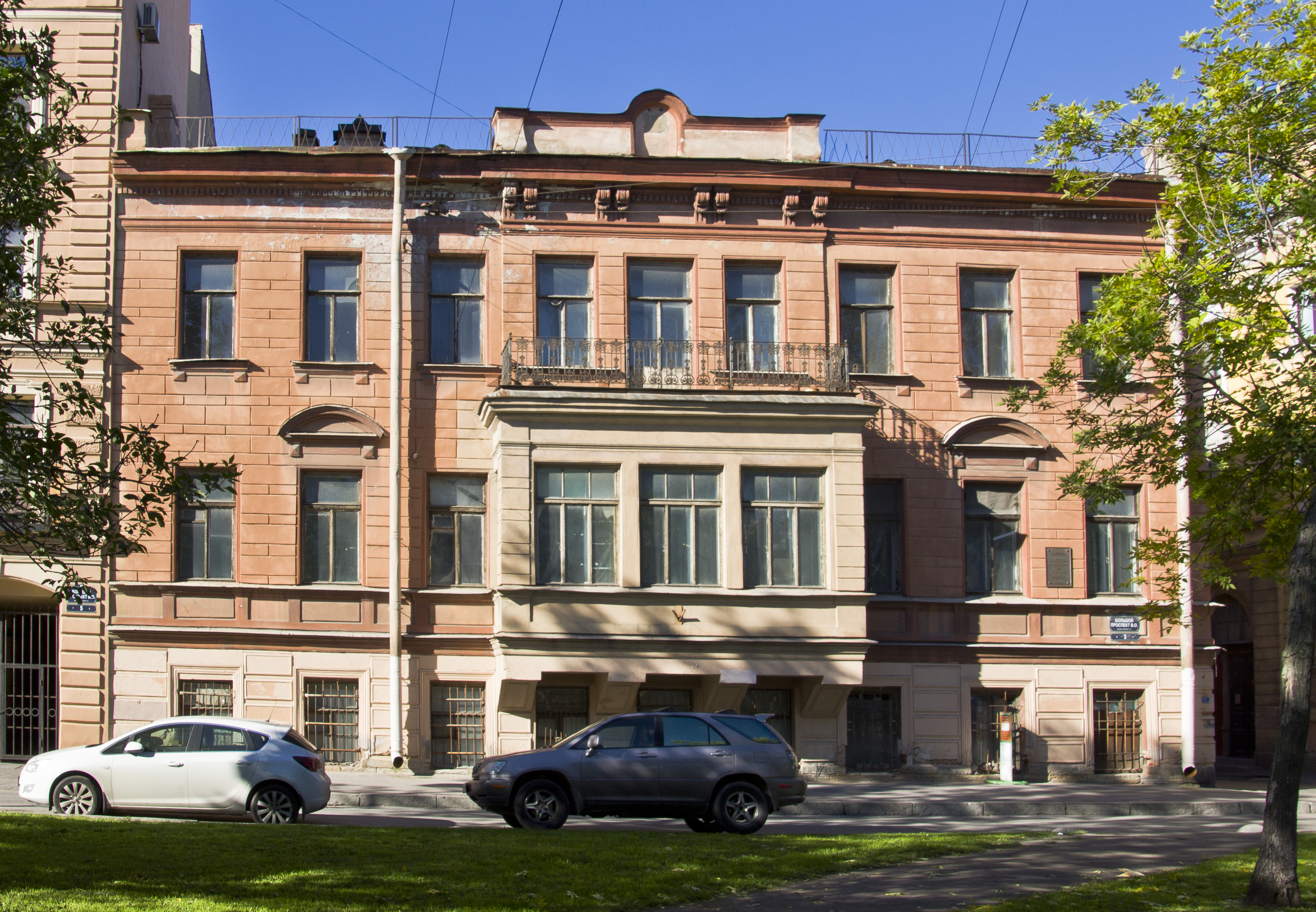 Большой пр., д.3